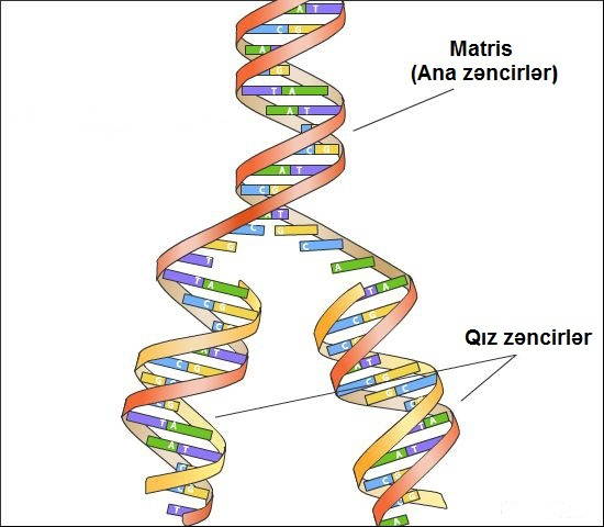 rduplikasiya